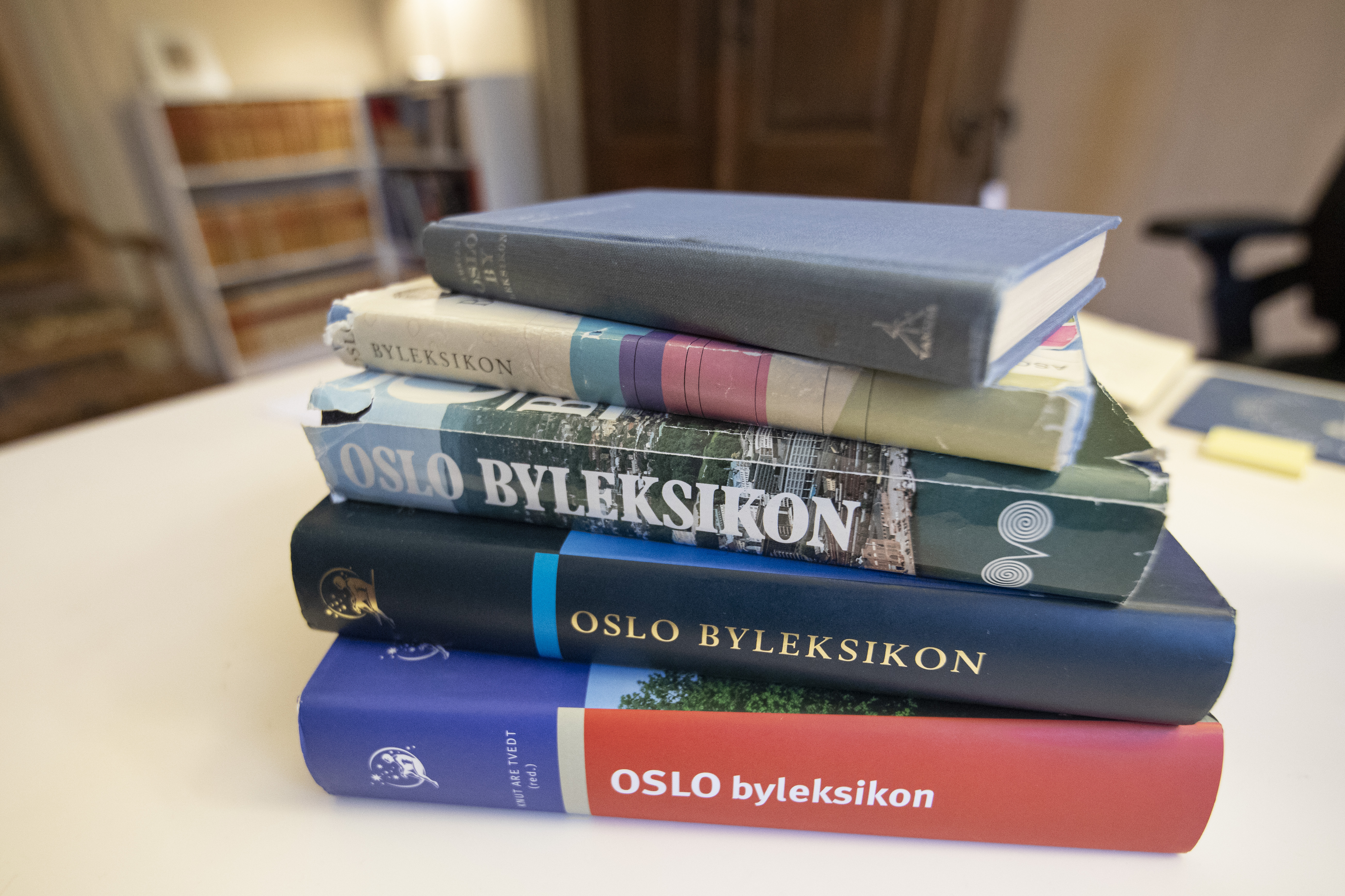 Alle fem papirutgavene av Oslo Byleksikon stablet oppå hverandre.